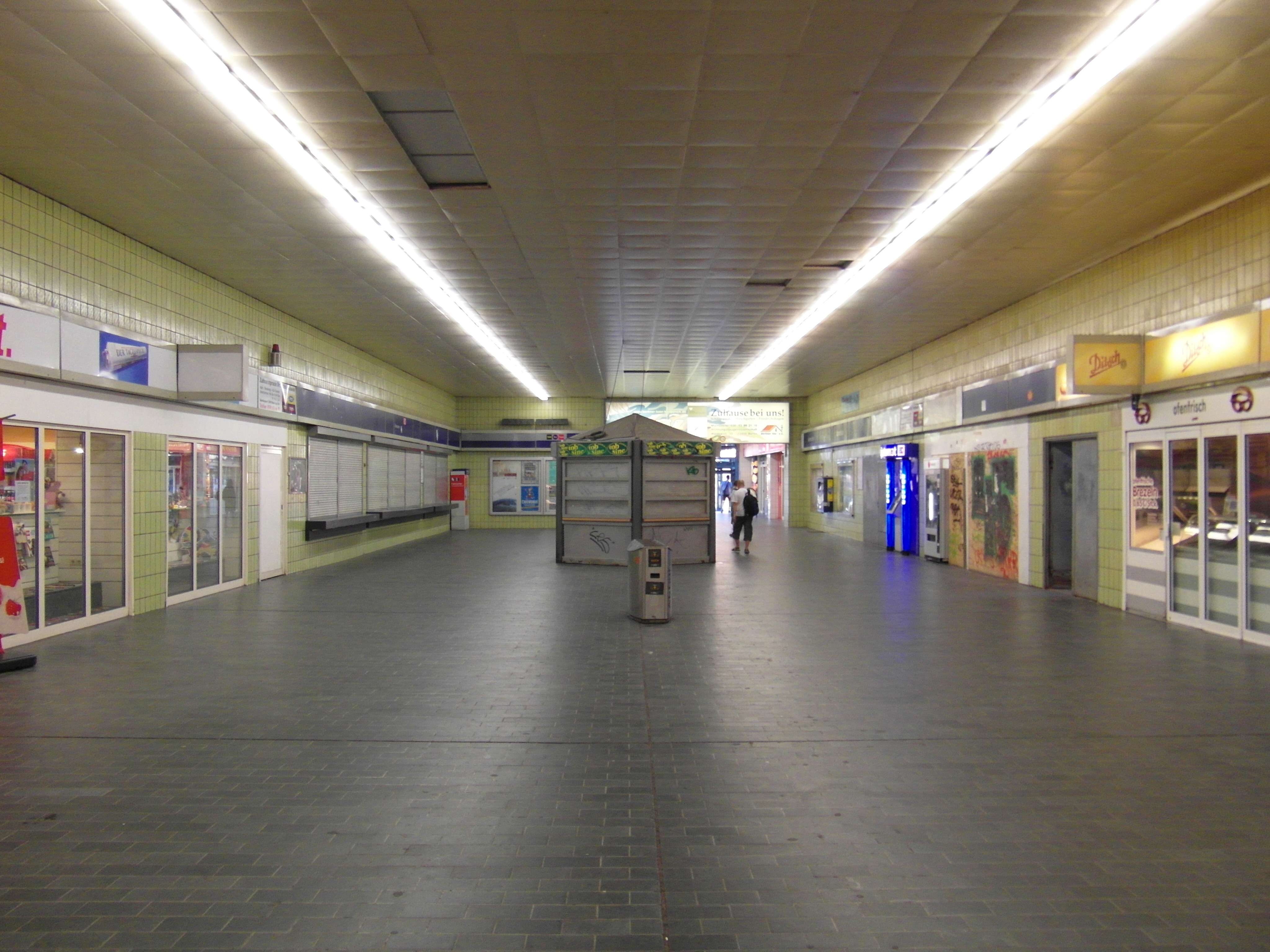 In der Schalterhalle